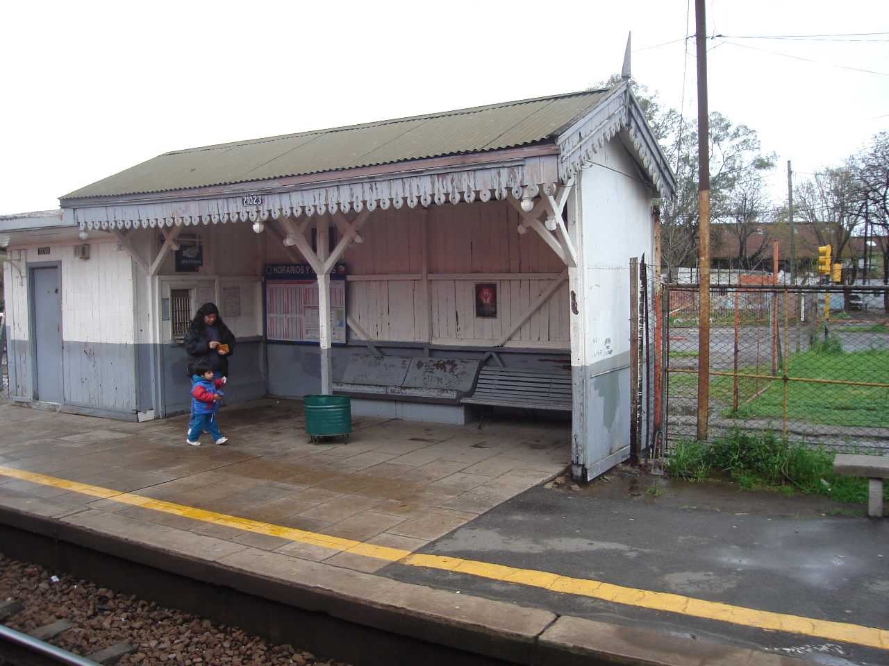 Refugio sobre el andén descendente de la estación Saldías del Ferrocarril General Belgrano. Buenos Aires, Argentina.